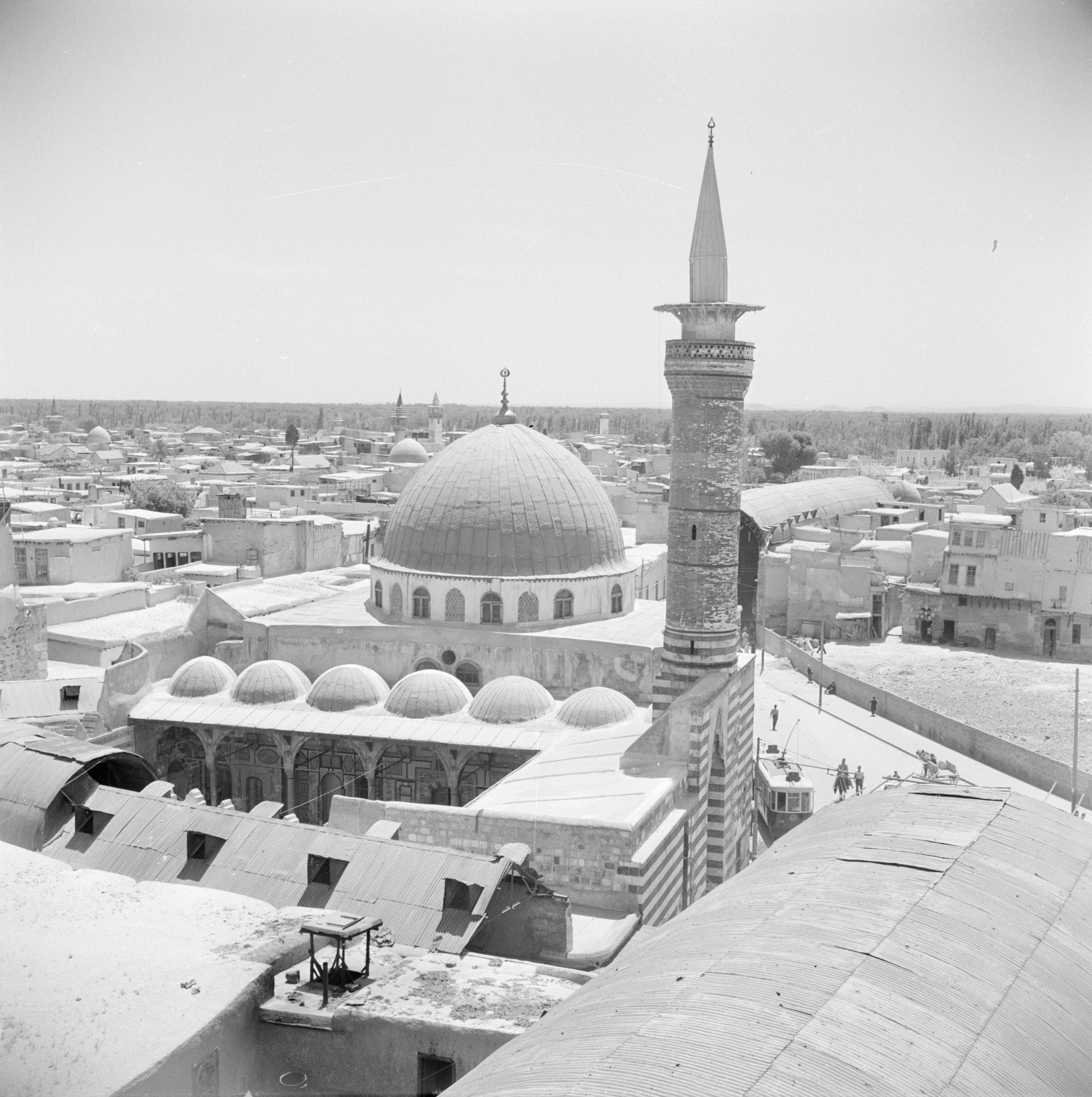 Collectie / Archief : Fotocollectie Van de Poll Reportage / Serie : Midden-Oosten 1950-1955: Syrië - Damascus Beschrijving : Boven aanzicht van de Senanieh moskee Datum : 1950 Locatie : Damascus, Syrië Trefwoorden : gebouwen, minaretten, moskeeën, panorama, stadsbeelden Fotograaf : Poll, Willem van de Auteursrechthebbende : Nationaal Archief Materiaalsoort : Negatief (zwart/wit) Nummer archiefinventaris : bekijk toegang 2.24.14.02 Bestanddeelnummer : 255-5849